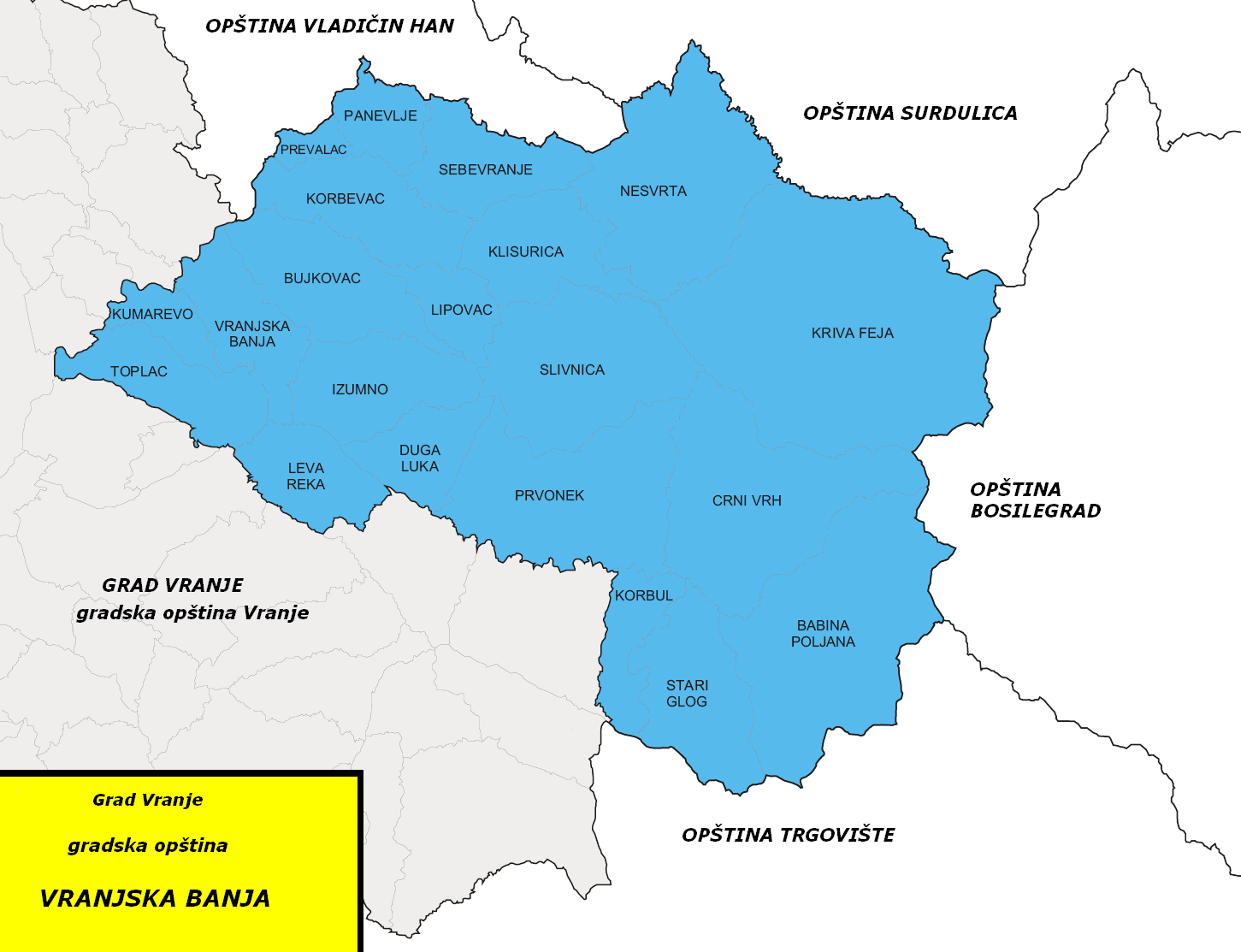 Naseljena mesta gradske opštine Vranjska Banja. Autor: Varjačić Vladimir